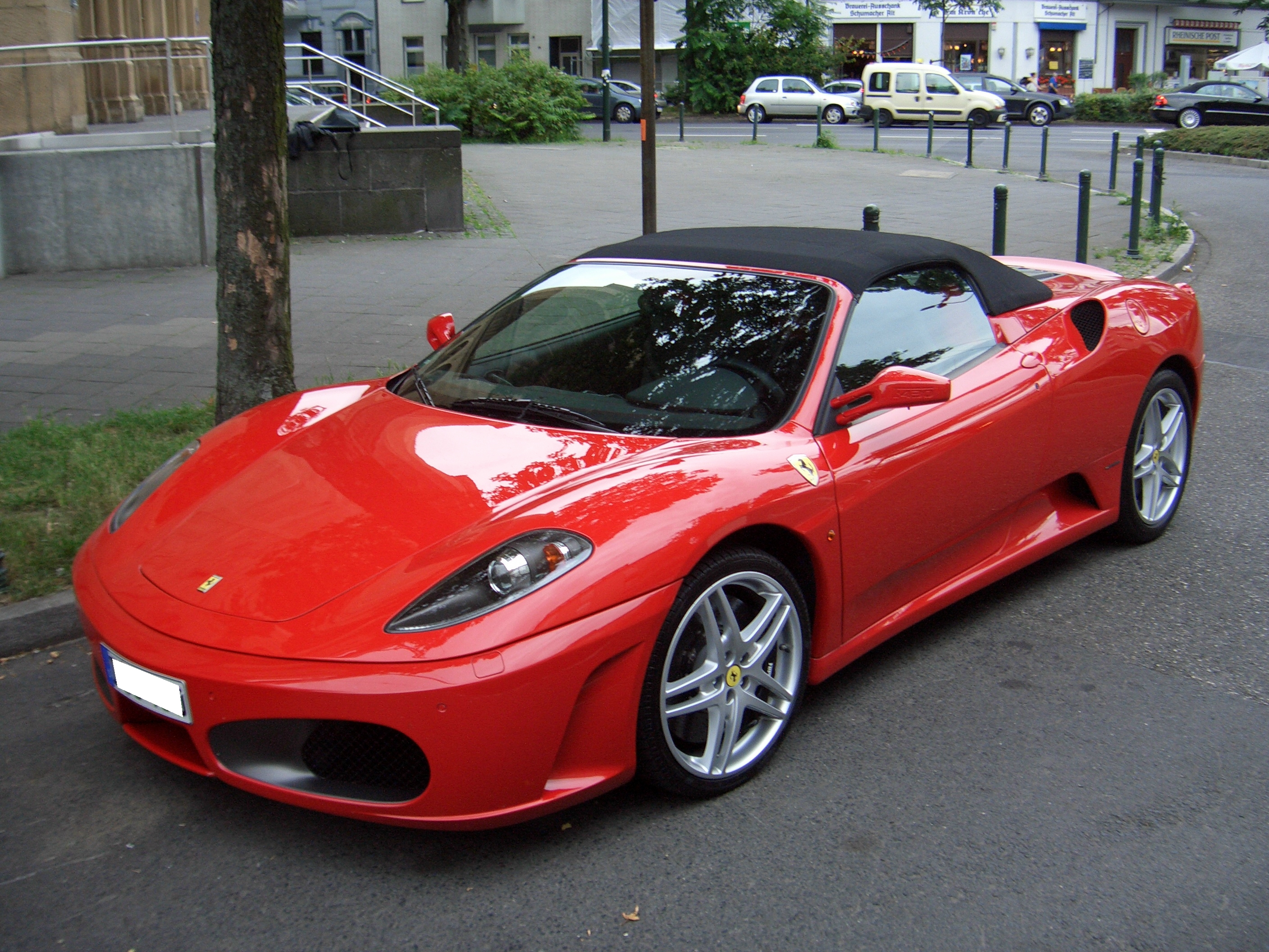 Ferrari F430 Spider, from 2004, seen in Duesseldorf, Germany